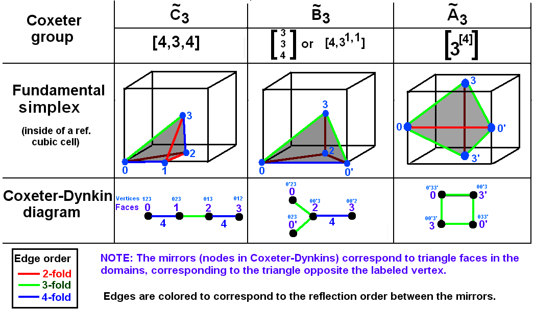 Exemple de diagramme de Coxeter-Dynkin